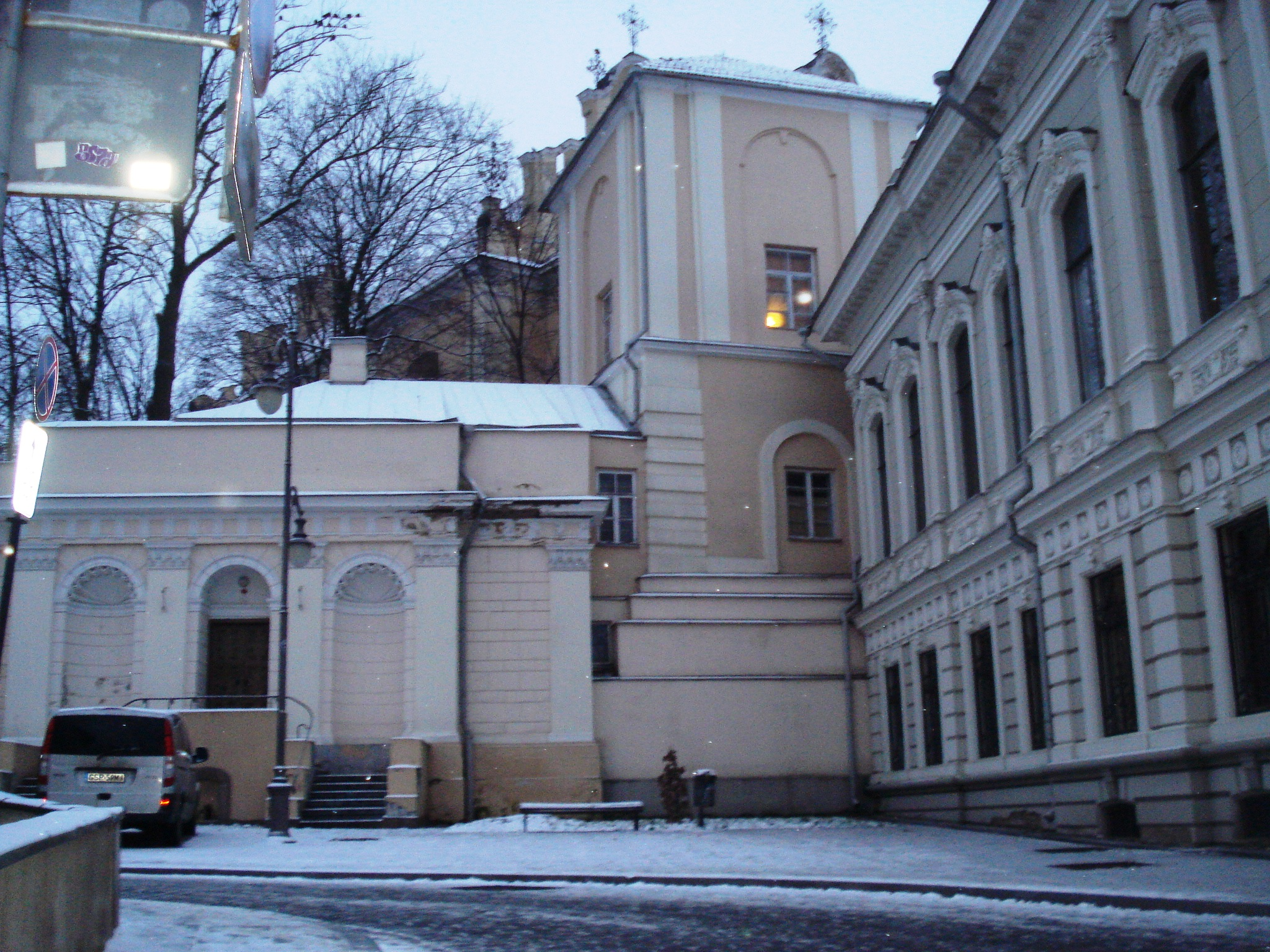 Ворота в стиле ампир (проект архитектора Жозефа Пусье, 1809) и четырёхугольная колокольня монастыря кармелитов. Вильнюс